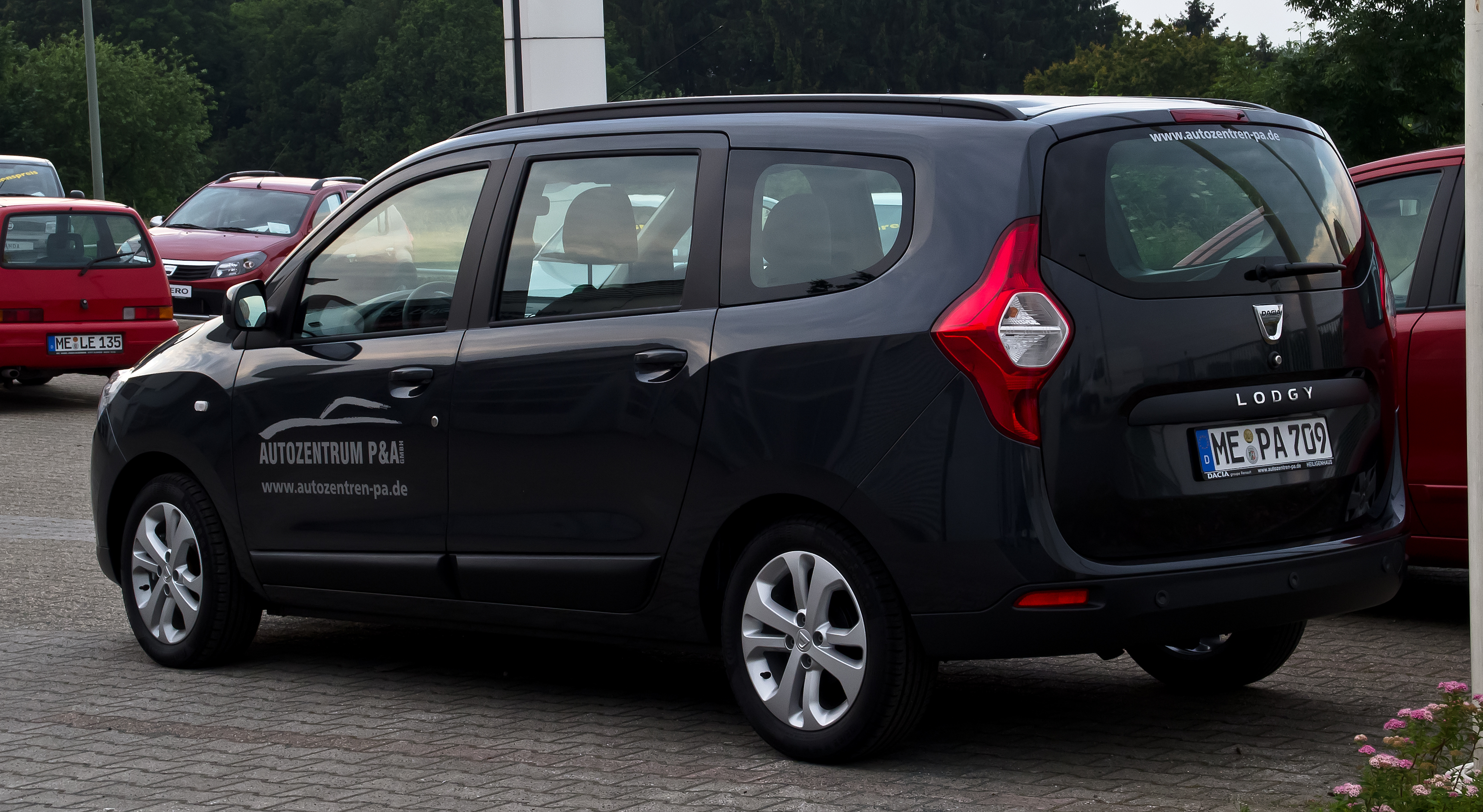 Dacia Lodgy dCi 110 eco² Prestige